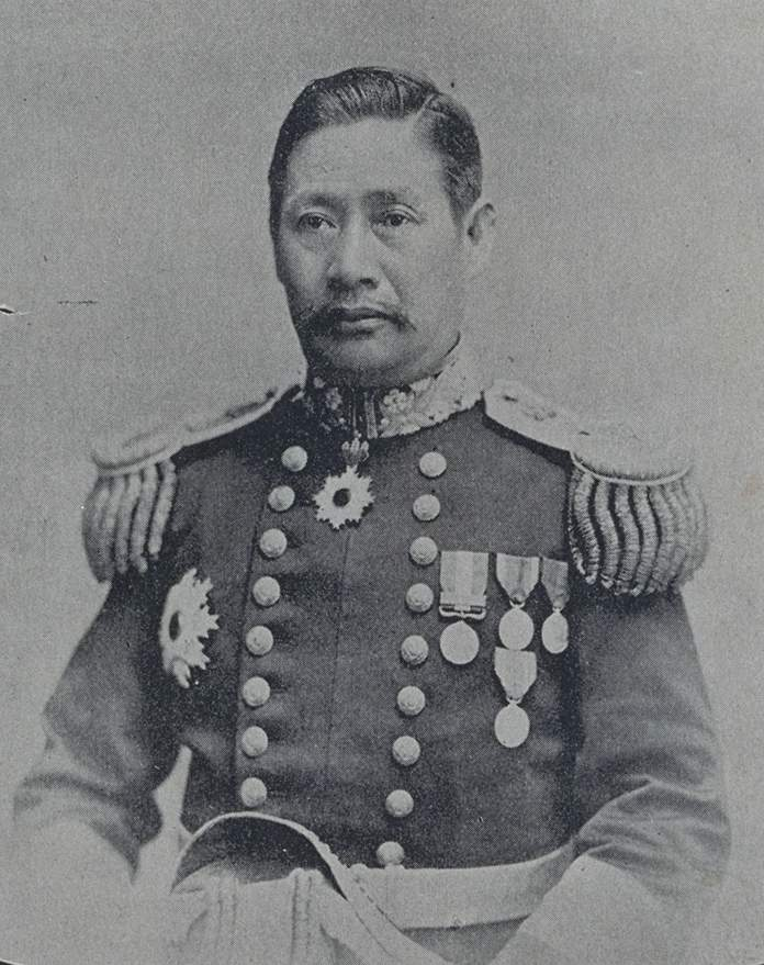 川口武定男爵（1846～1918）